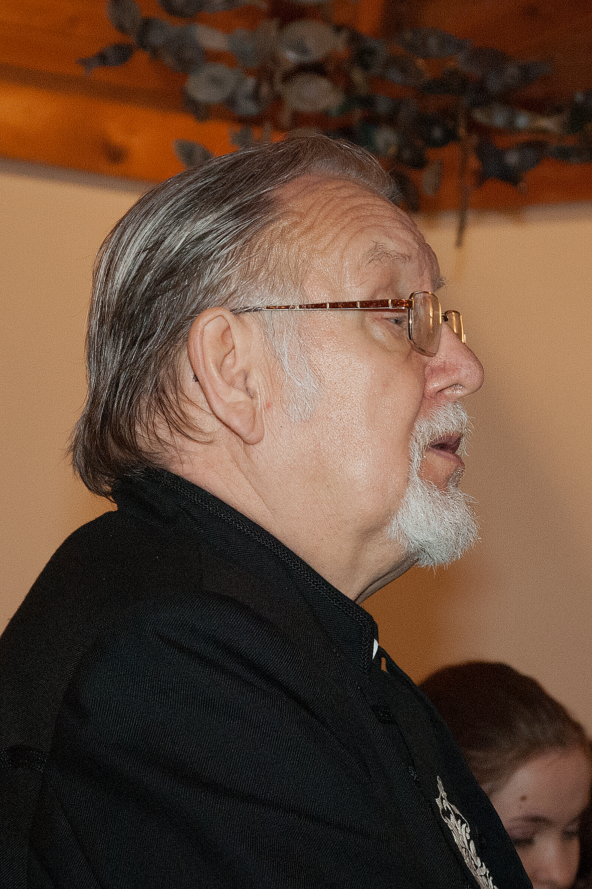 Berkesi Sándor arcképe